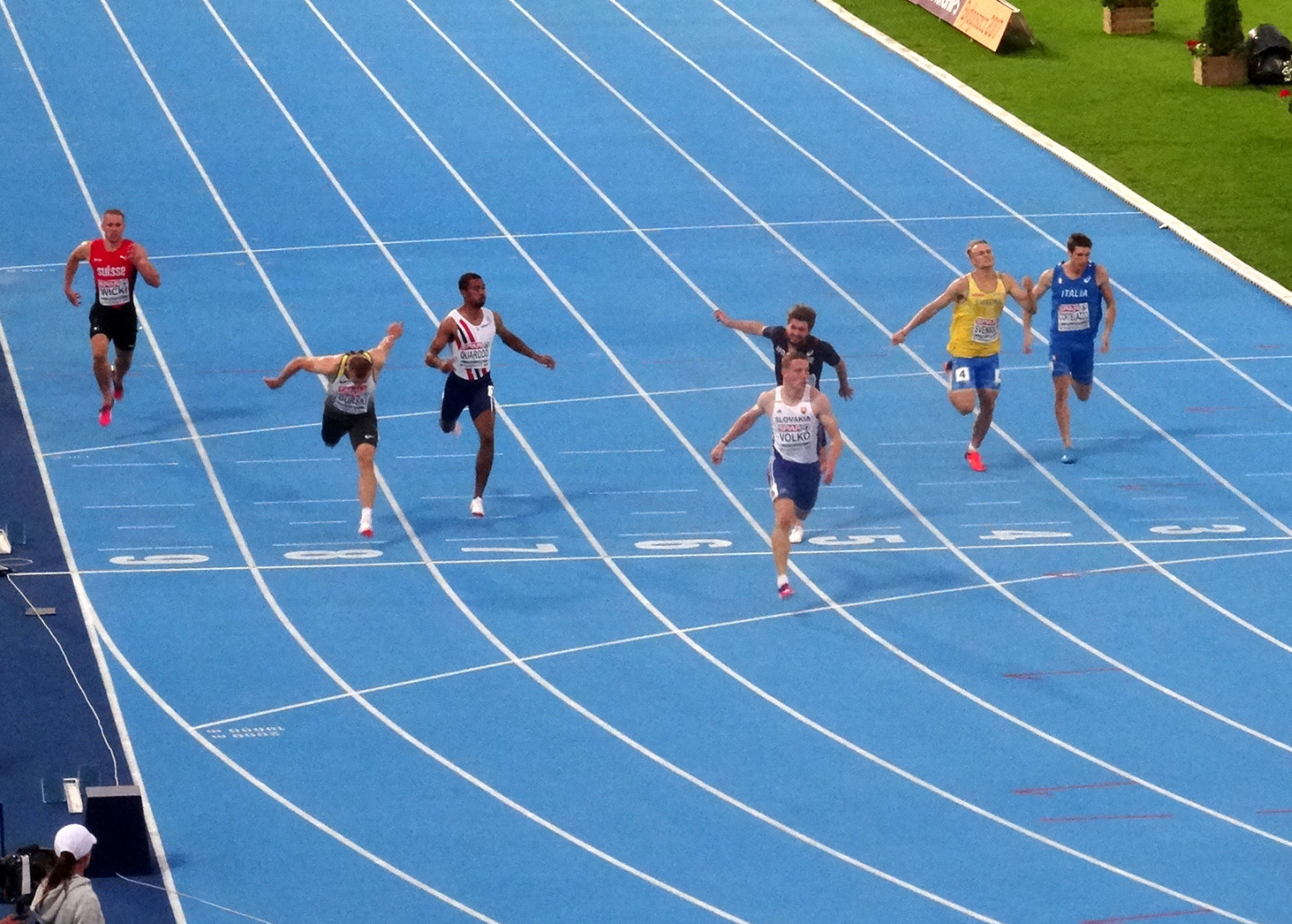 Młodzieżowe Mistrzostwa Europy w Lekkoatletyce U23 w Bydgoszczy 13-16 lipca 2017, finał biegu na 200 m mężczyzn